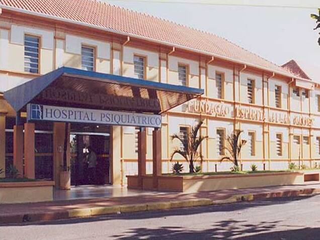 Façade de l'hôpital Allan Kardec à Franca, Brésil, 2008.